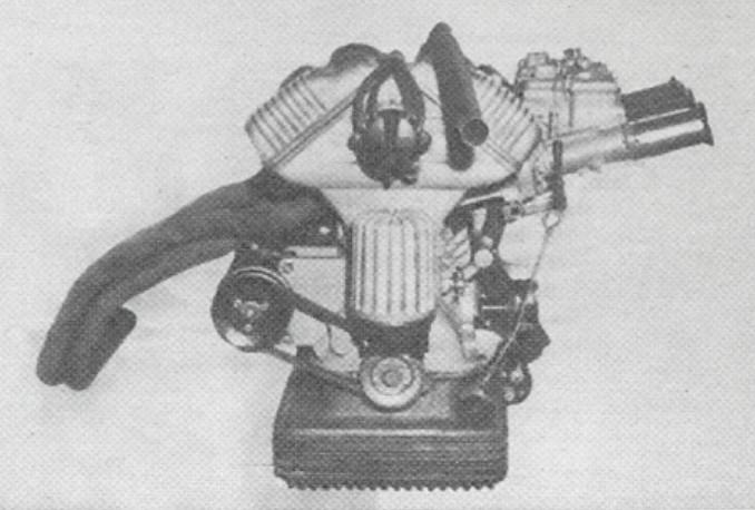 Motore della Bandini 1000 GT tratta dal libro: Bandini